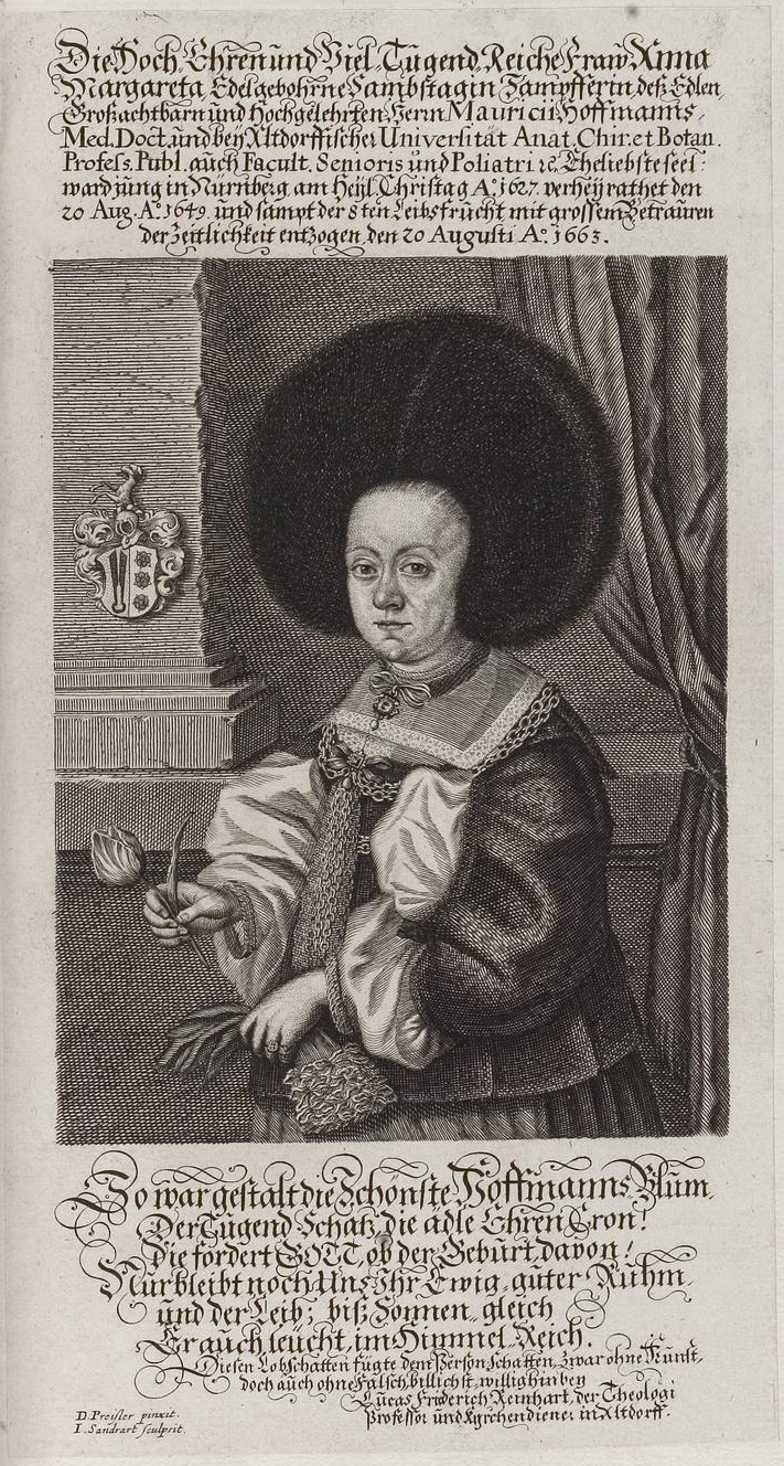 Grafik aus dem Klebeband Nr. 3 der Fürstlich Waldeckschen Hofbibliothek Arolsen Motiv: Anna Margareta Hoffmann geb. Samstag (1627–1663), 1649 Heirat mit dem Mediziner und Naturforscher Moritz Hofmann